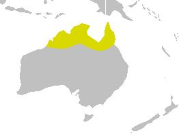 Description=Areale di distribuzione della specie